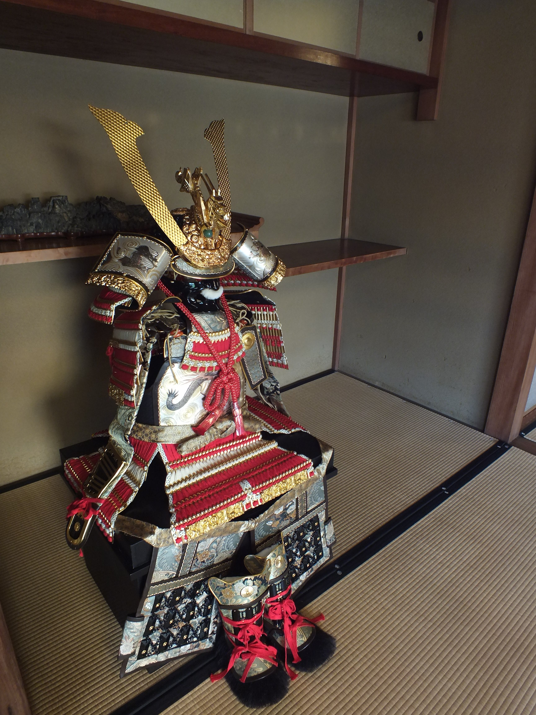 Old Kishi-House Nishiwaki,Hyogo,Japan 旧来住家住宅（来住梅吉旧邸）